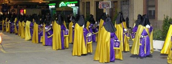 Vestas de la Hermandad